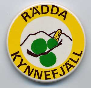 Foto av rocmärke för Rädda Kynnefjäll